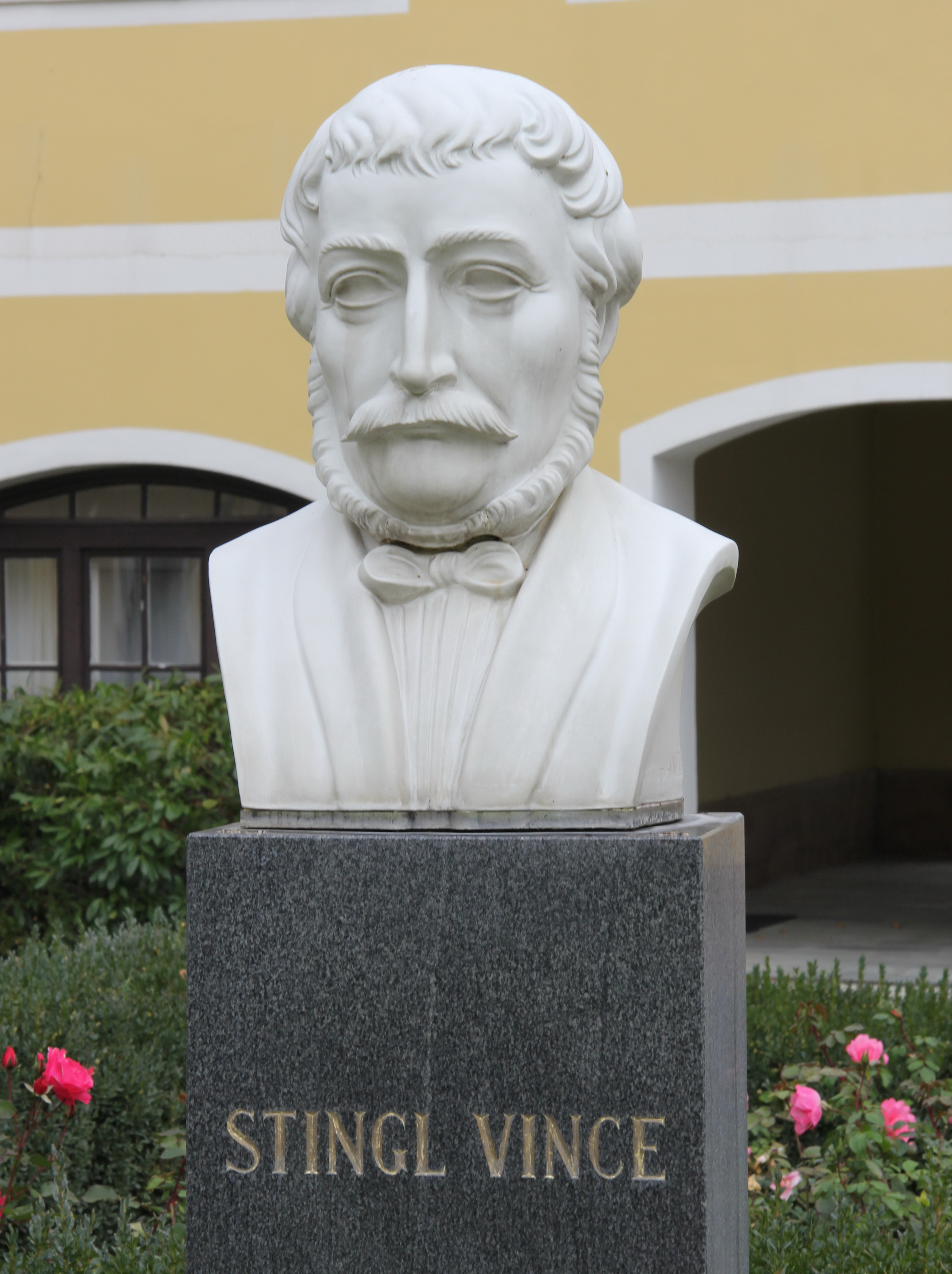 Stingl Vince mellszobra Herenden (Hanzély Jenő alkotása, 1976)